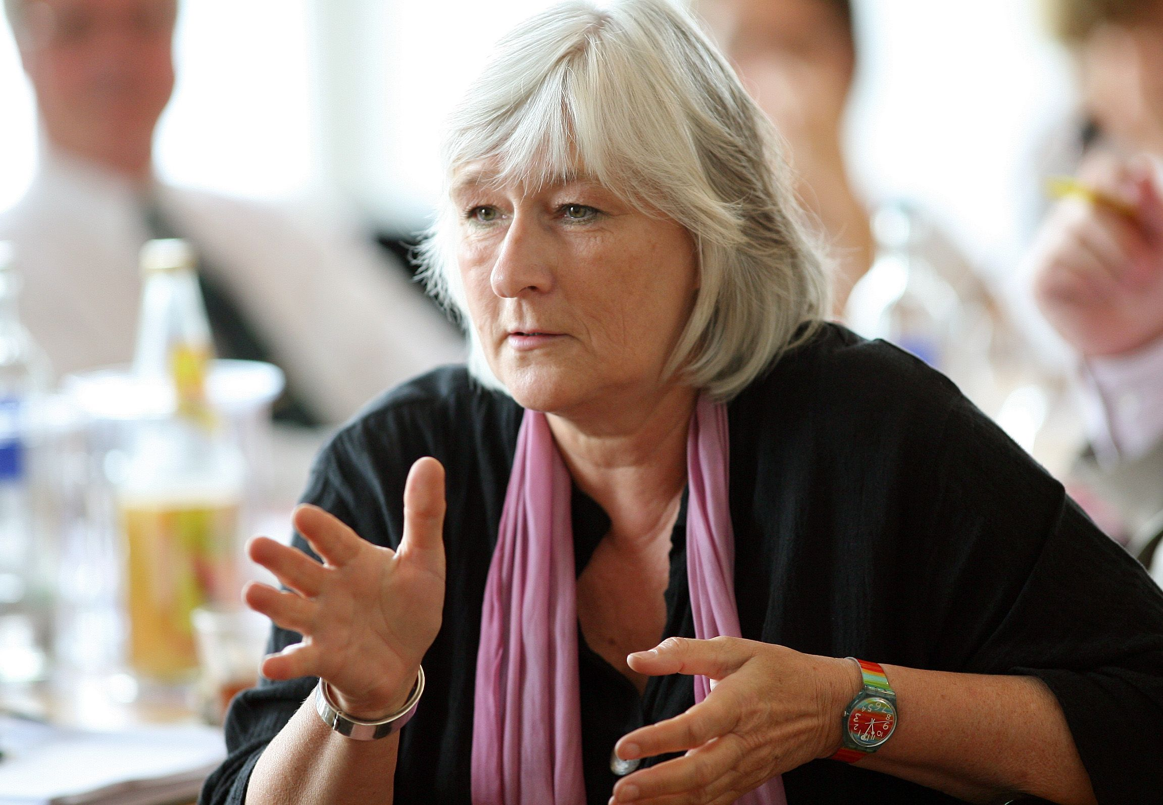 Frau Gisela Bill im Landtag Rheinland-Pfalz